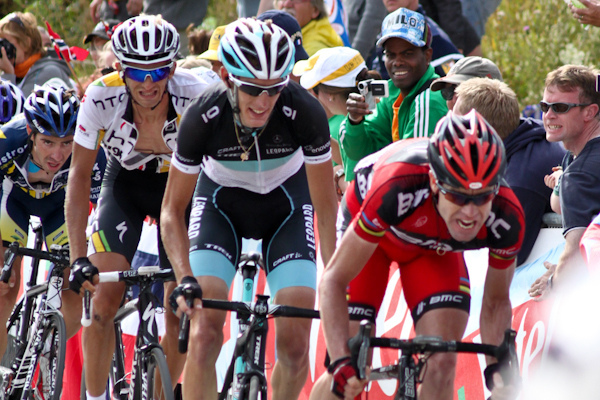 Cadel Evans y Andy Schleck subiendo el Alpe d'Huez durante el Tour de Francia 2011